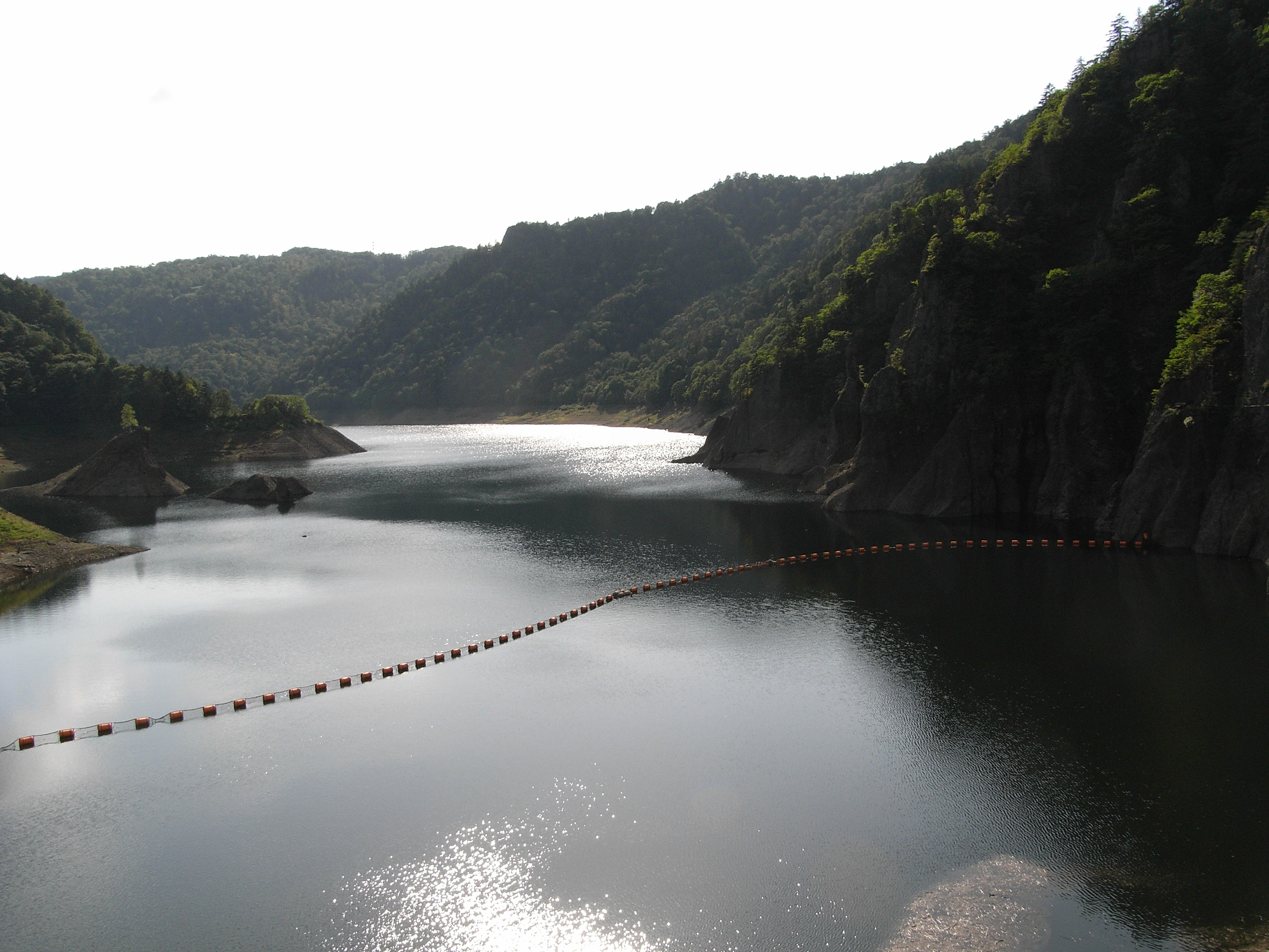 Lake